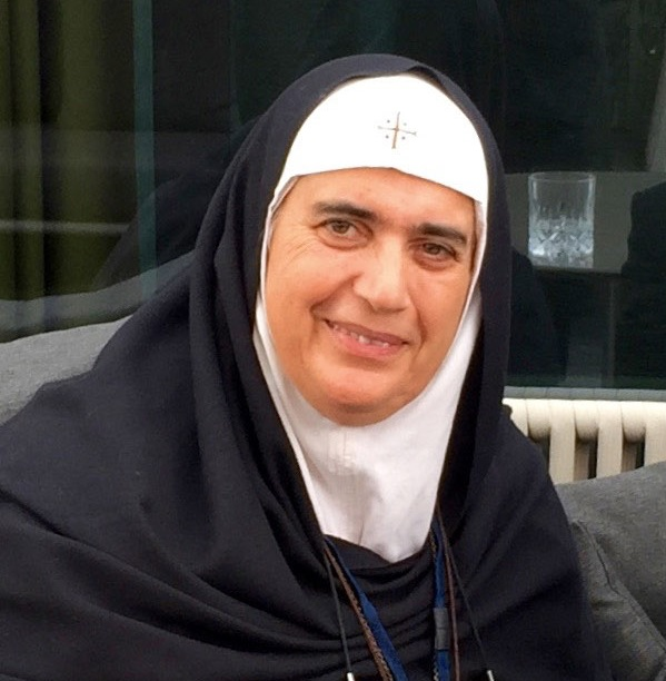 Mère Agnès-Maryam de la Croix.